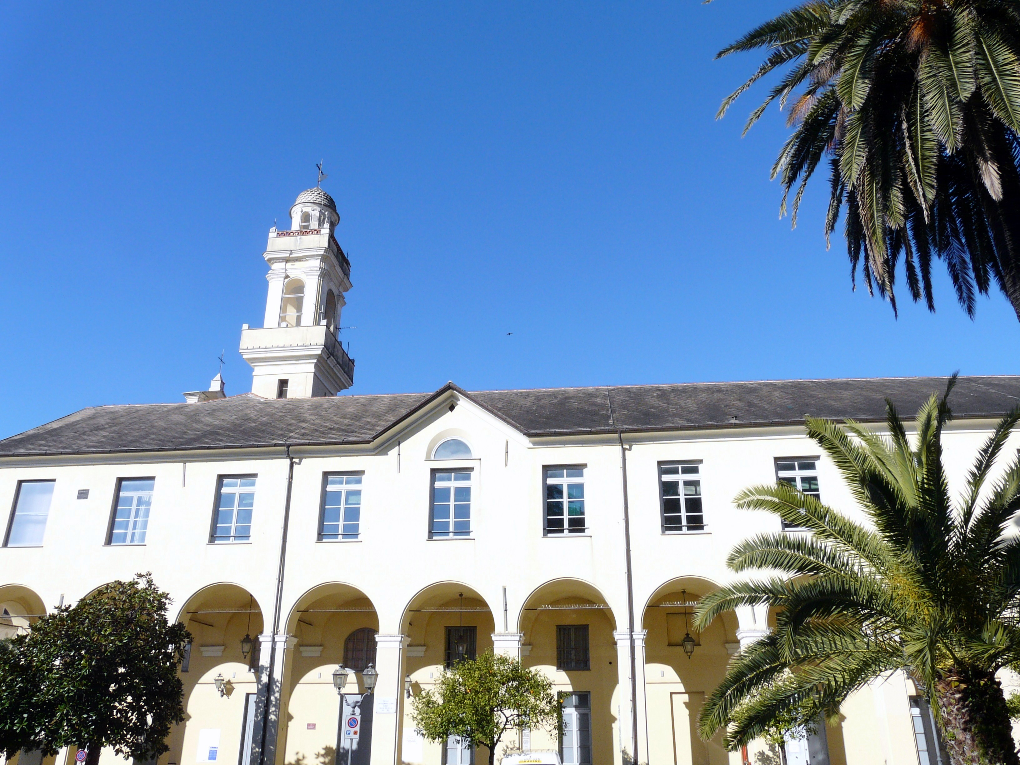 Ex complesso monastico delle Clarisse di Rapallo, Liguria, Italia